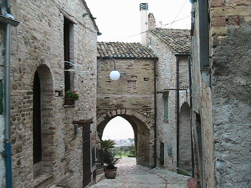 Scorcio